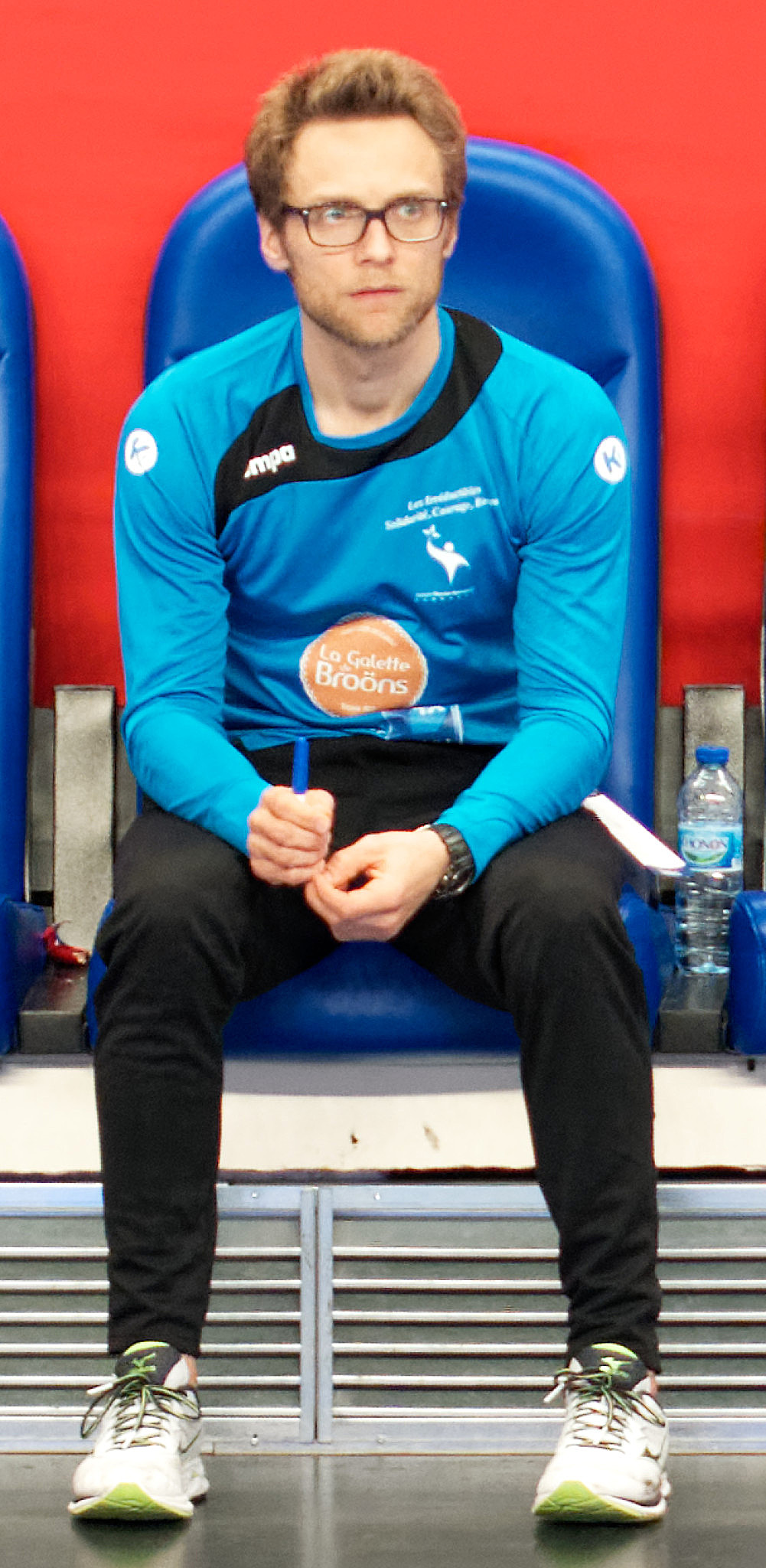 Rencontre de Championnat de LidlStarLigue entre le PSG et Cesson-Rennes Métropole. A Coubertin, le 19 avril 2017.